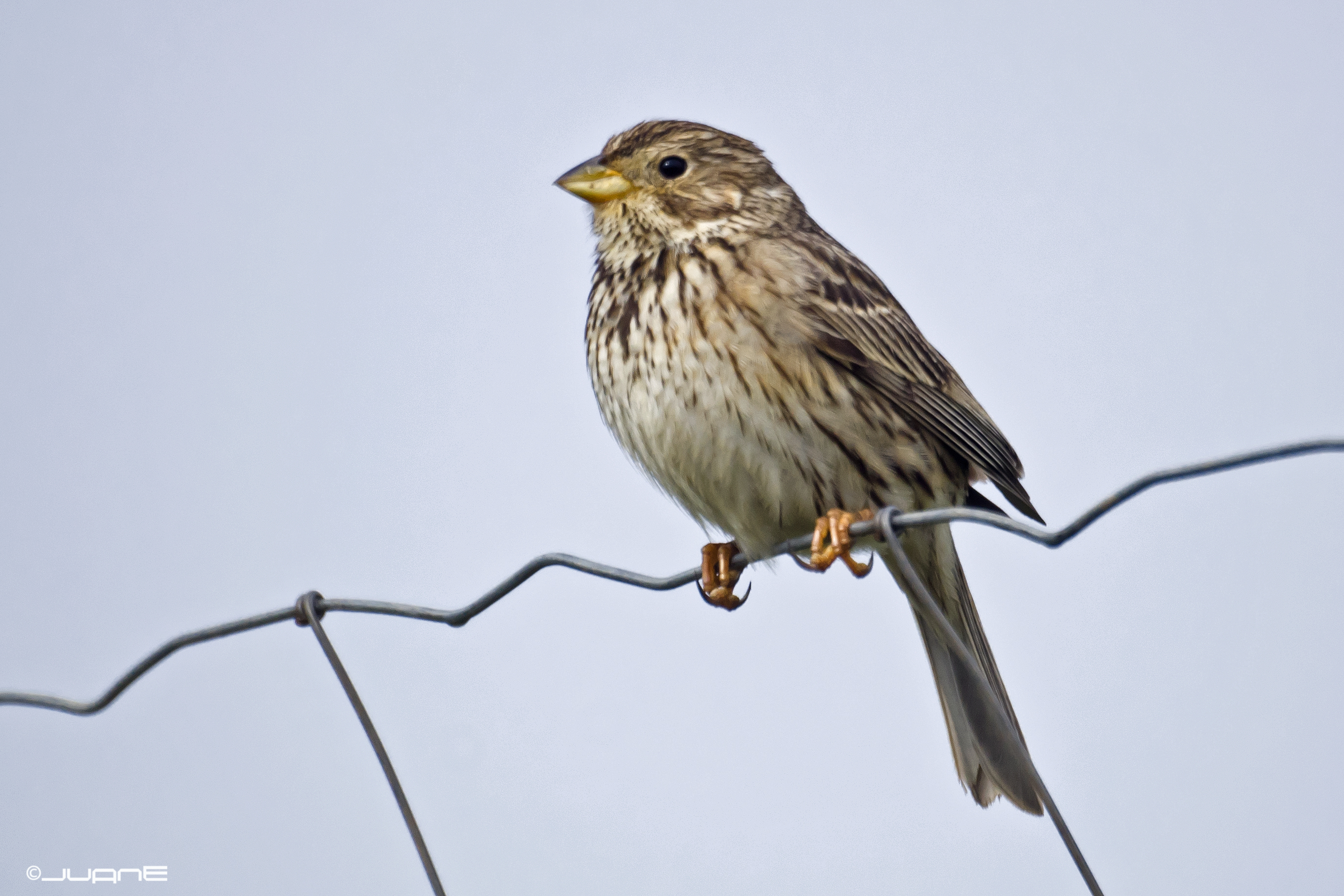 Triguero, Miliaria calandria.